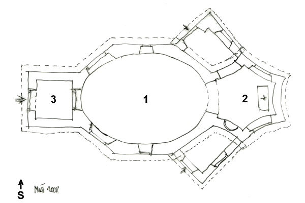 schématický půdorys kostela svatého Prokopa v Chotouni dle projektu Jana Santiniho